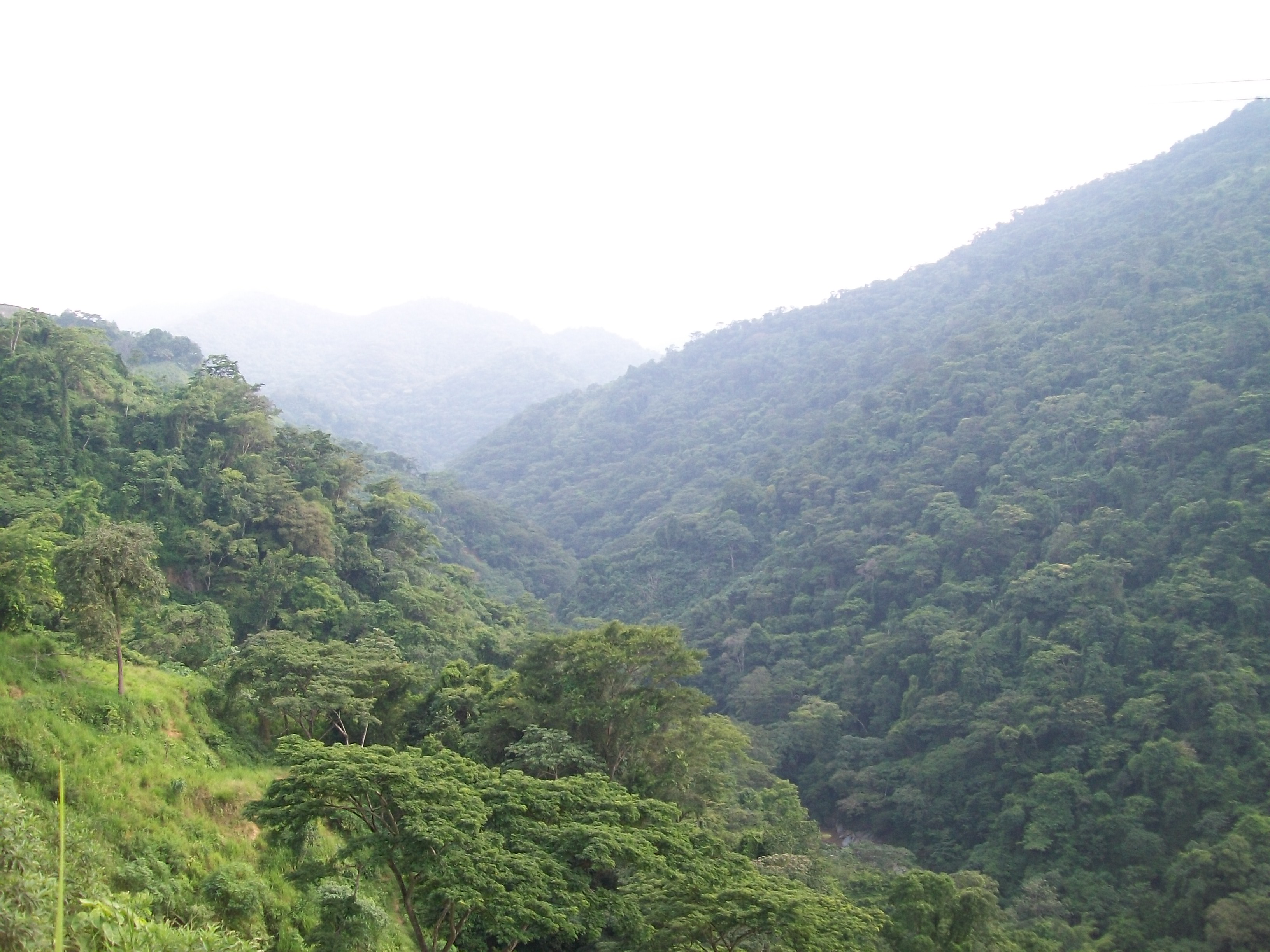 Paisaje montañas Edo. Lara